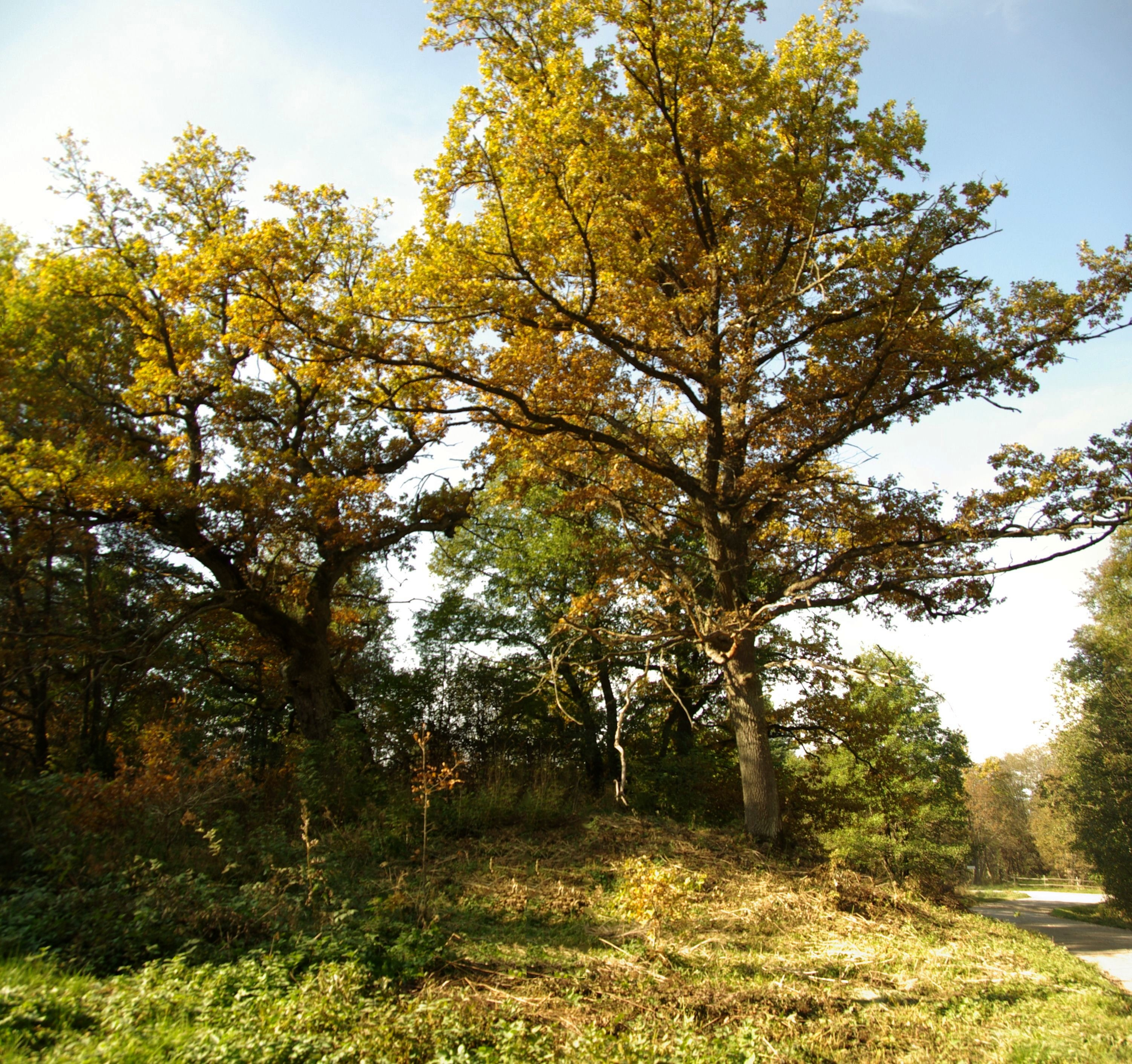 Samuli tammed kasvavad Harju maakonnas Andineeme külas